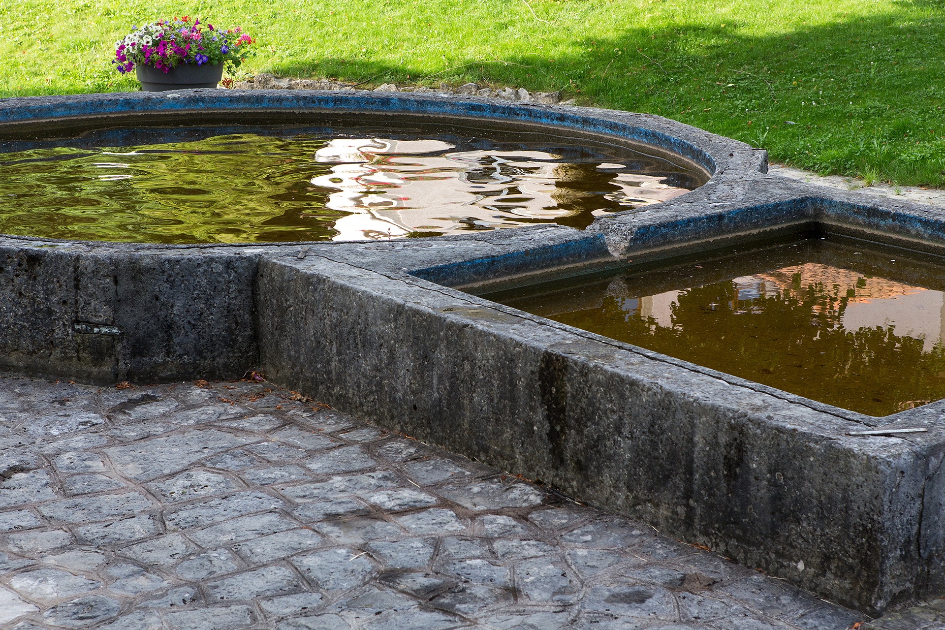 Der grosse Brunnen in Grandfontaine, der dem Dorf den Namen gab.